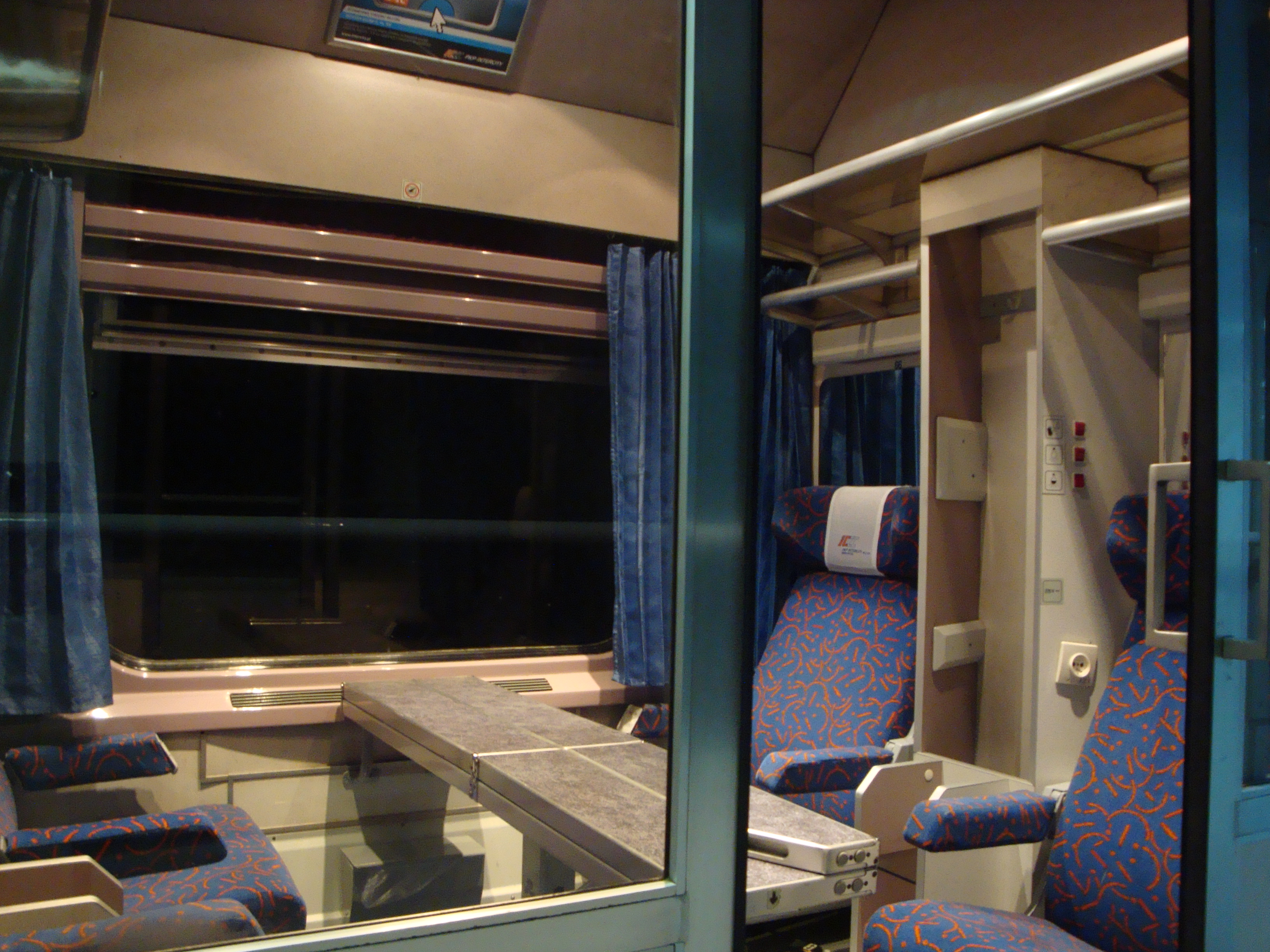 Przedział menedżerski PKP Intercity.